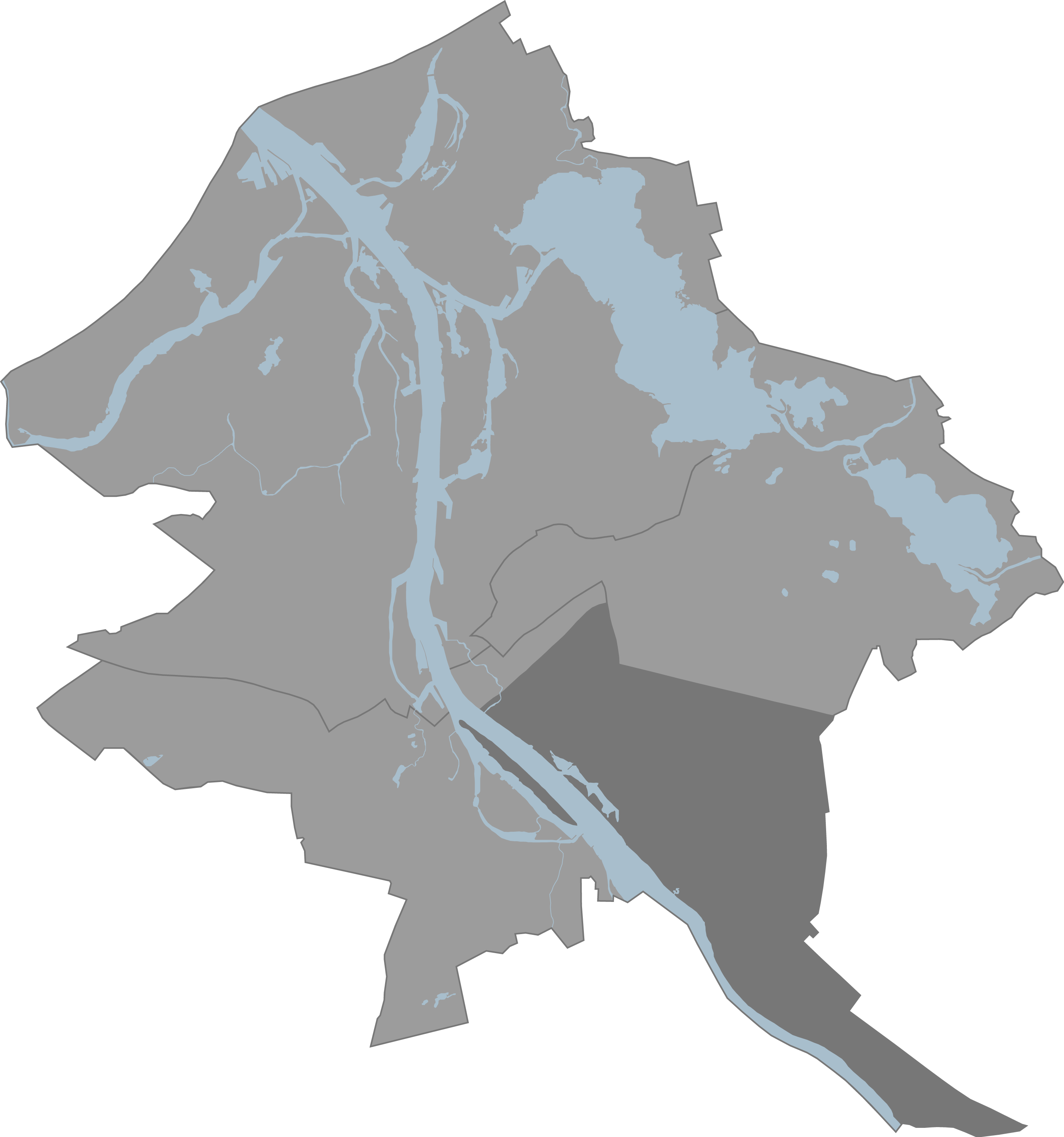 Riga Latgales priekspilseta karte